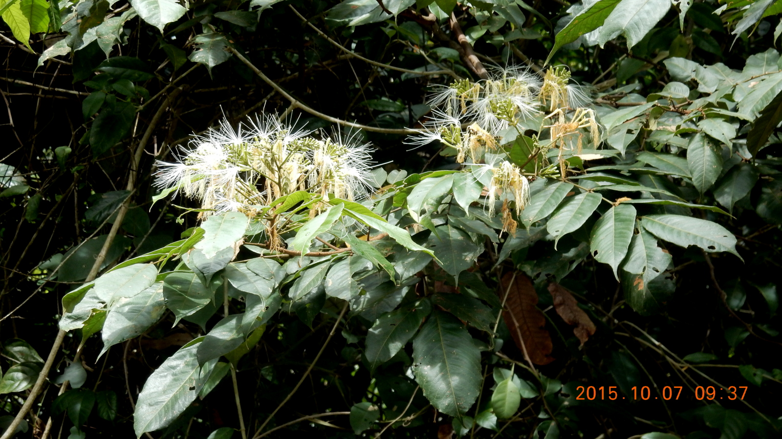 Inga rubiginosa (Rich.) DC.